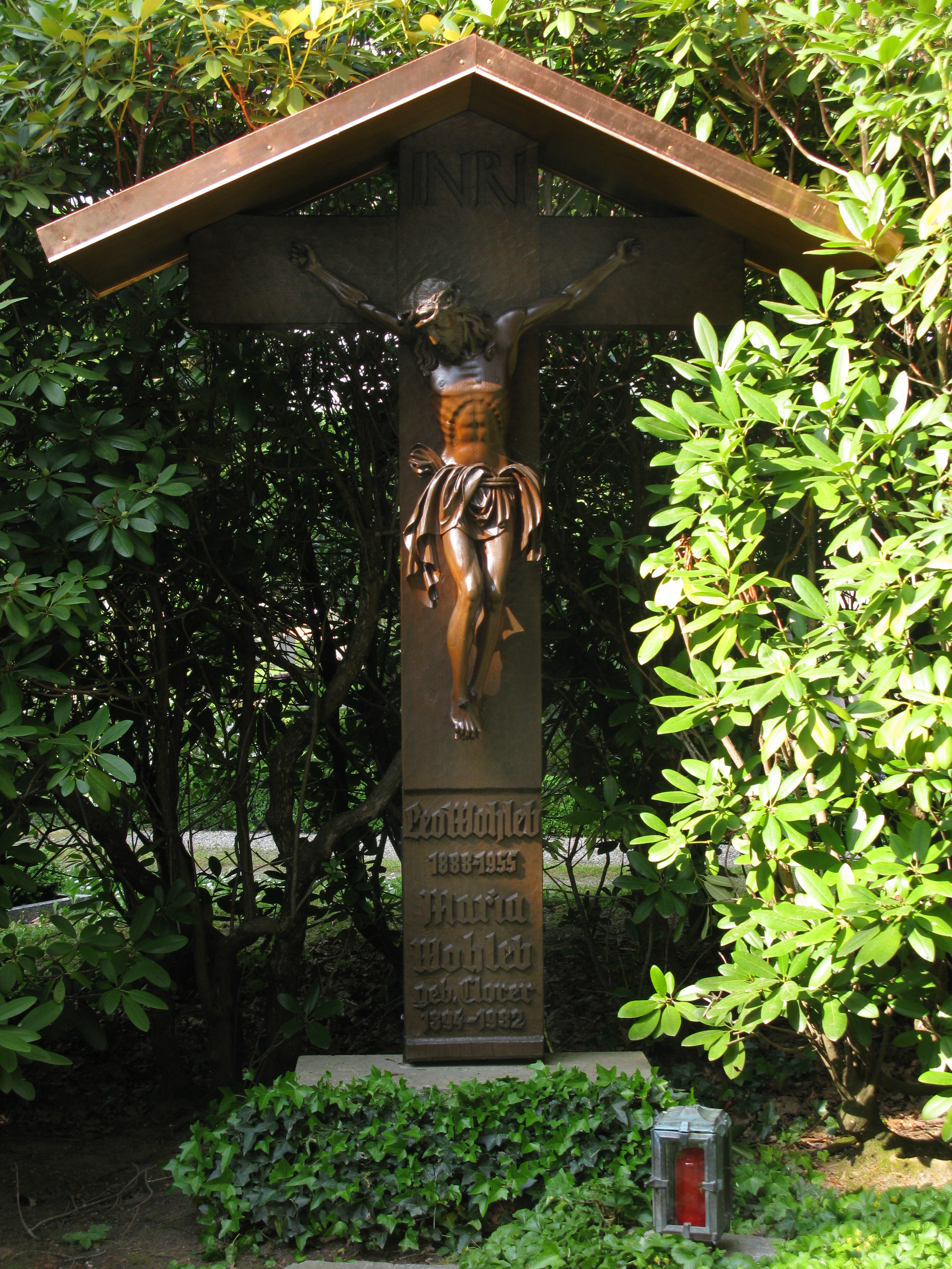 Wohleb, Leo, bad. Staatspräsident